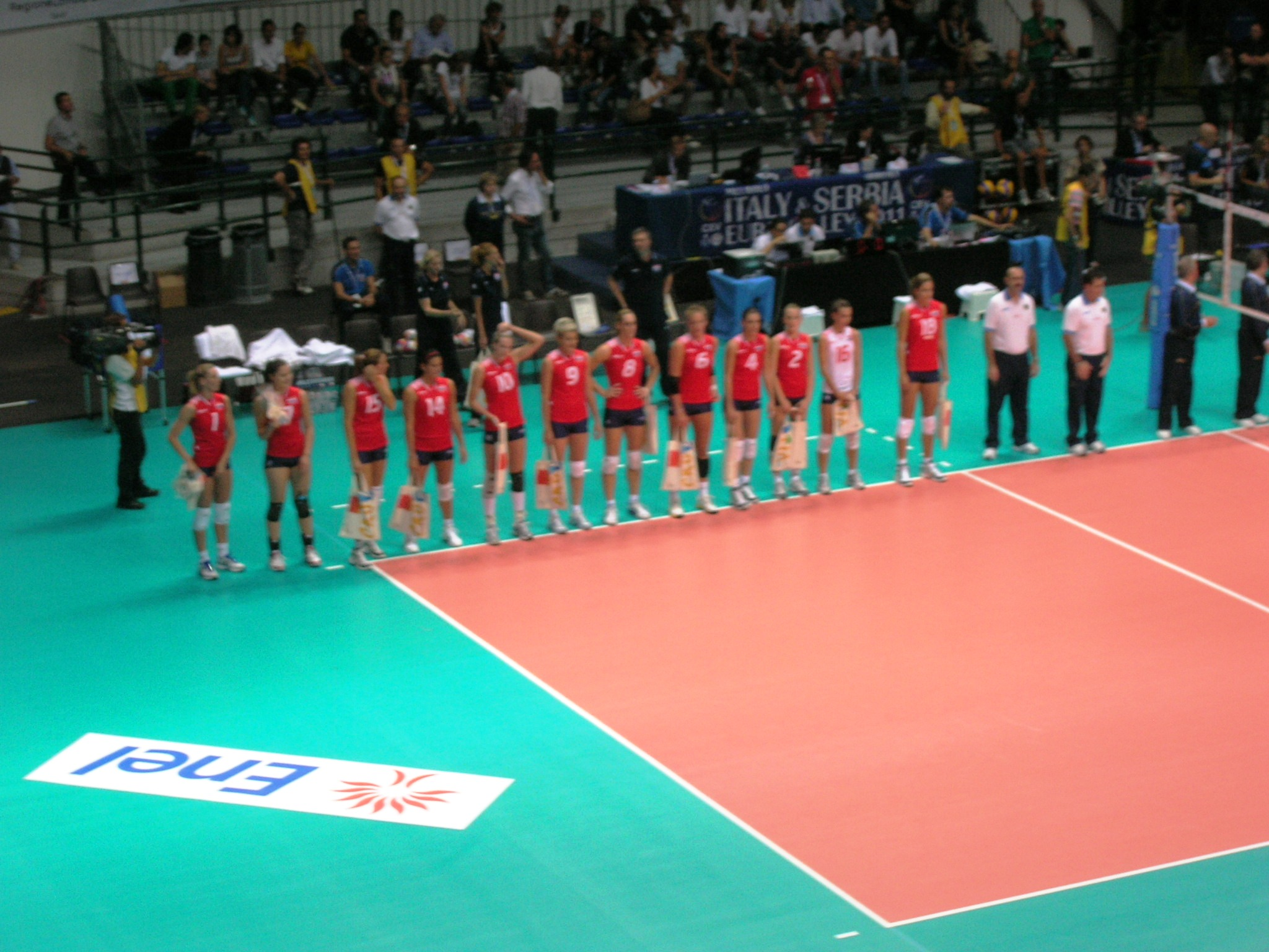 Partita: Italia - Croazia 3-0